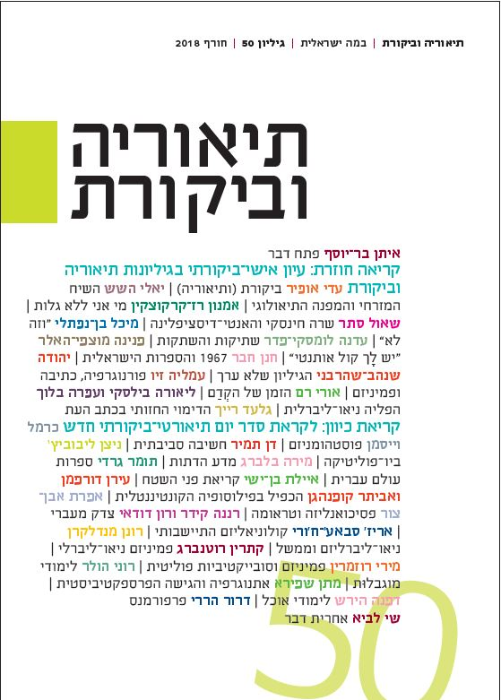 גיליון 50, חורף 2018